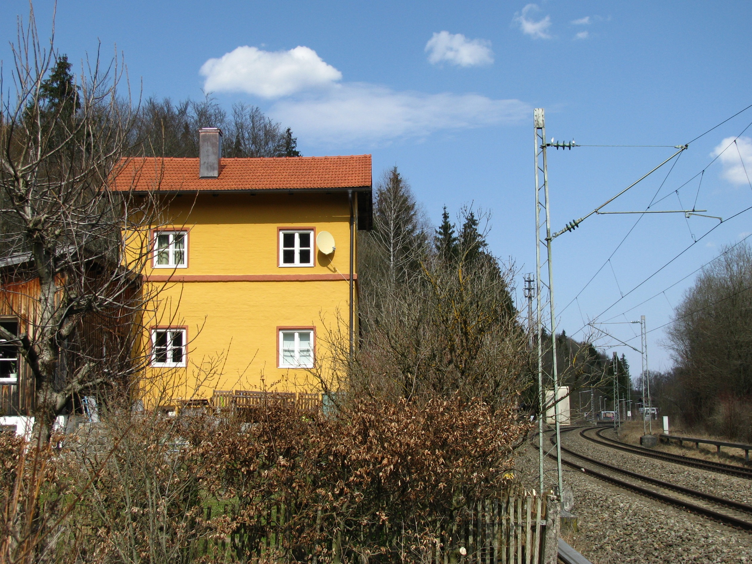 Streckenwärterhaus; zweigeschossiger Putzbau mit Flachsatteldach, um 1854.